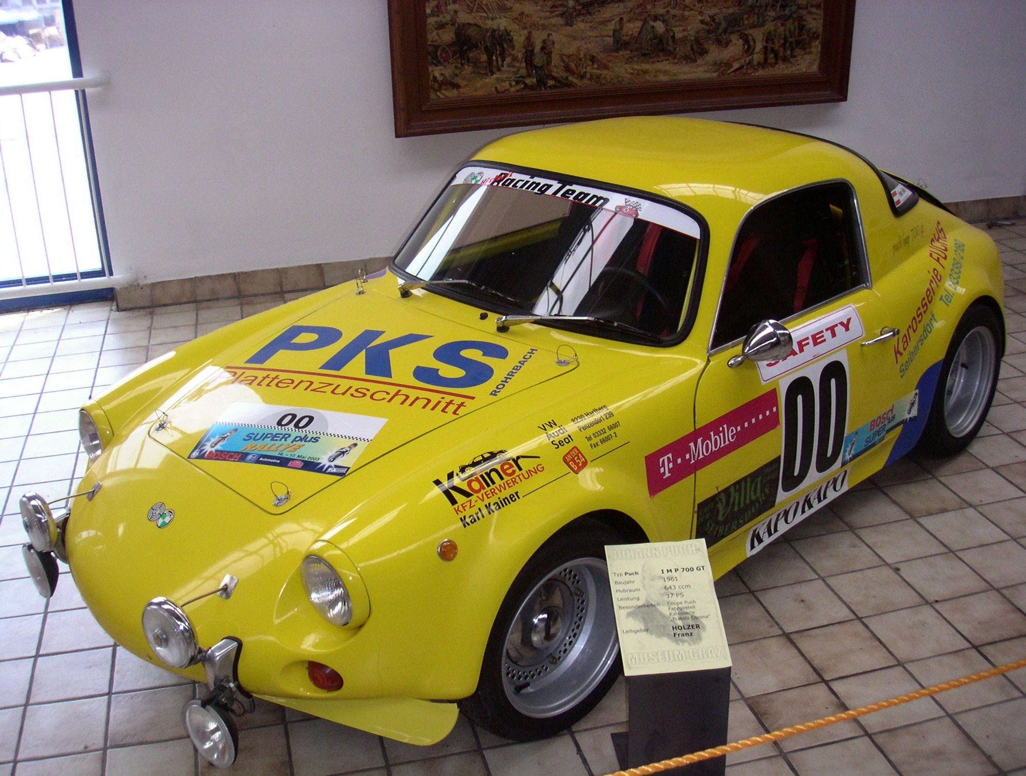 Intermeccanica Puch IMP_700_GT Coupé 1961, ausgestellt im Johann Puch Museum Graz, Mai 2004